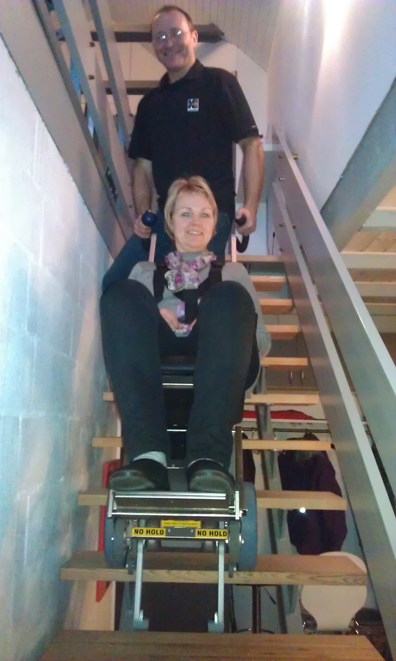 Trappemaskine til brug for personer